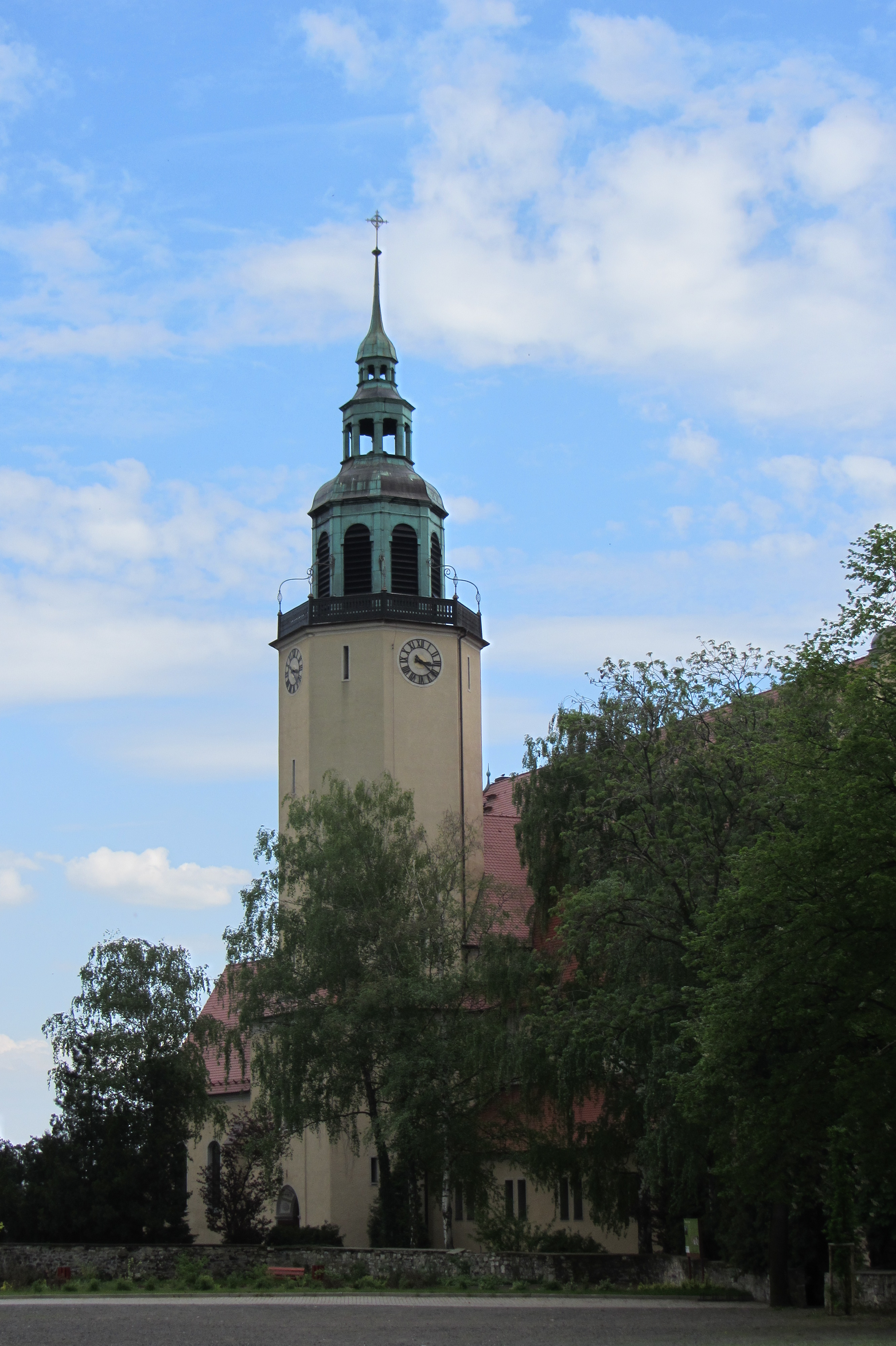 Chrząszczyce - kościół parafialny, 1920-1921, z kaplicą (prezbiterium d. kościoła), XIV w.